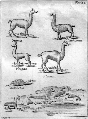 Illustration of lamines and other mammals from Vidaurre, o Gómez de Vidaurre, F. 1776. Compendio della storia geografica, naturale e civile del regno del Chile. 245 pp., 1 mapa, 10 láms. Bologna, Nella Stamperia di S. Tommaso d´Aquino.